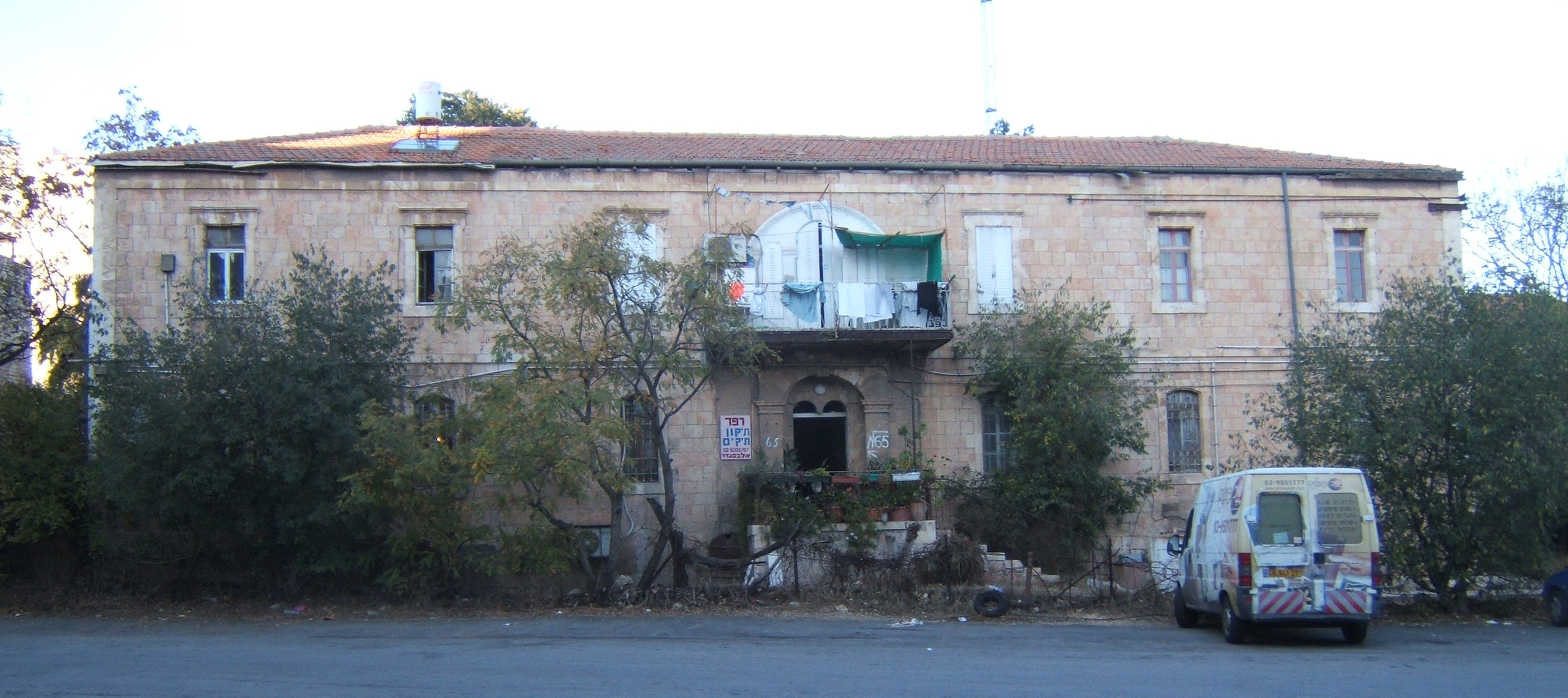 Kaminitz Hotel, 65 Street of Prophets, Jerusalem